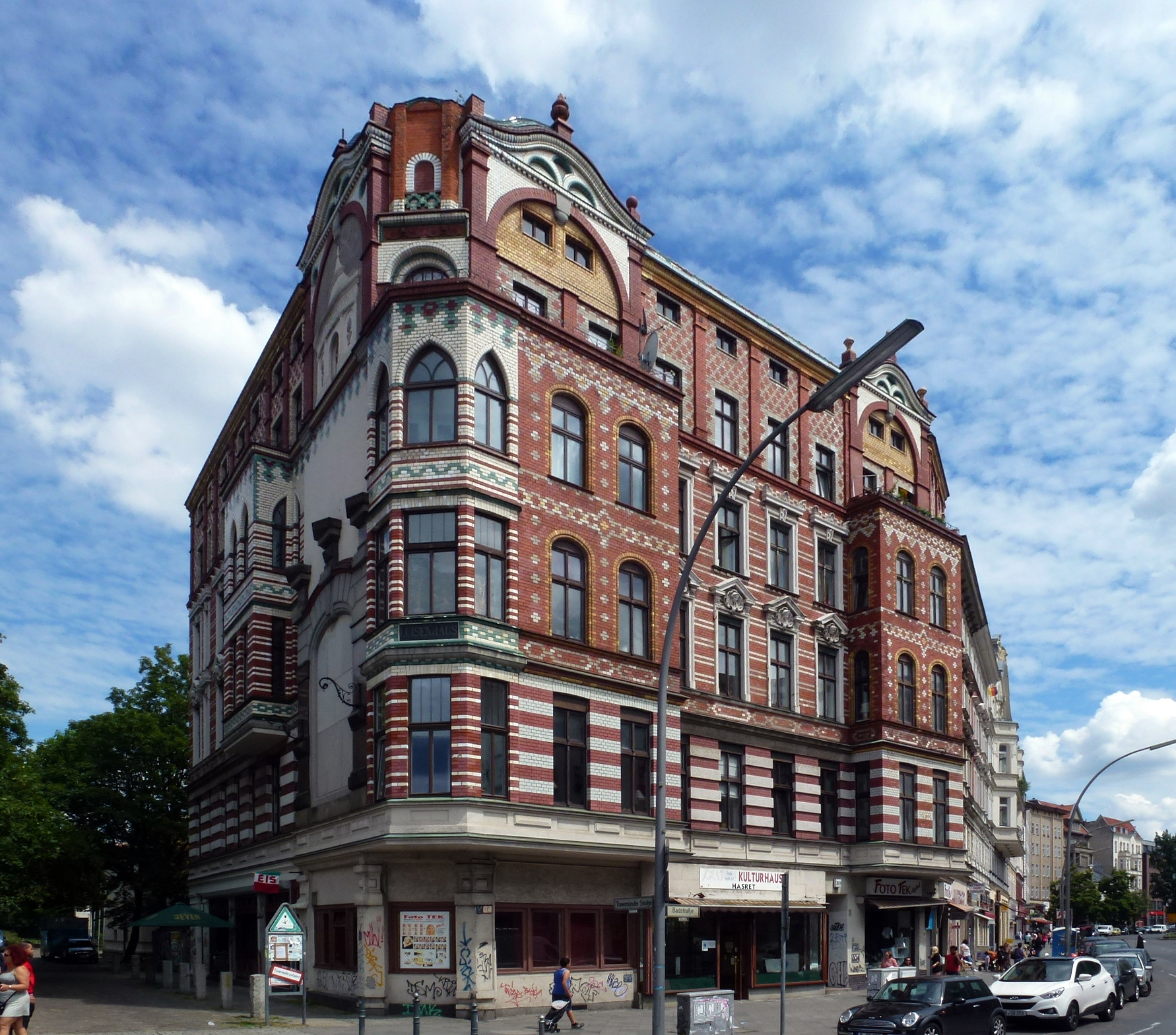 Berlin-Gesundbrunnen Badstraße Luisenhaus